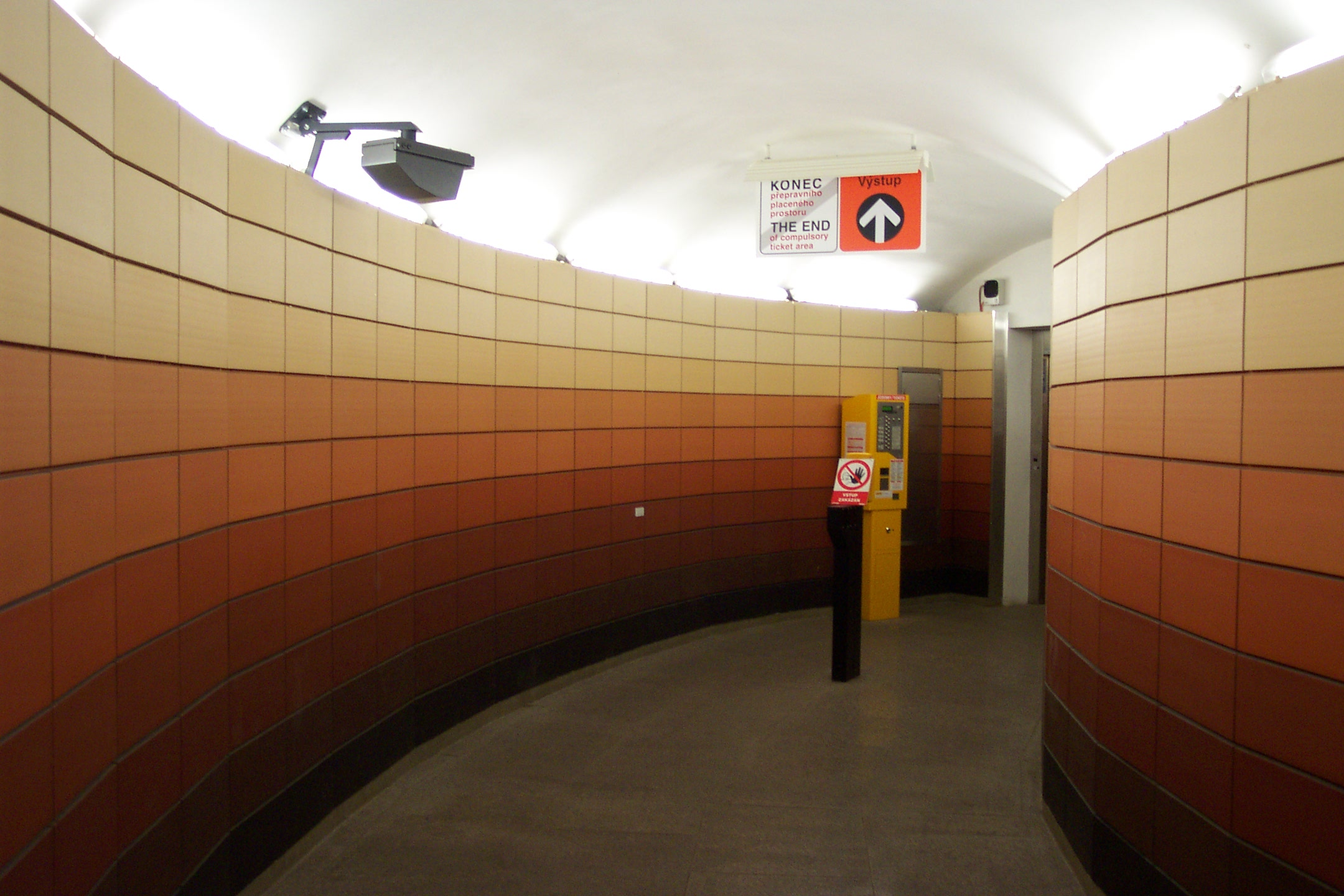 The elevator route at Florenc metro station in Prague (added in 2007) - Cesta k výtahům ve stanici metra Florenc v Praze, dobudováno roku 2007